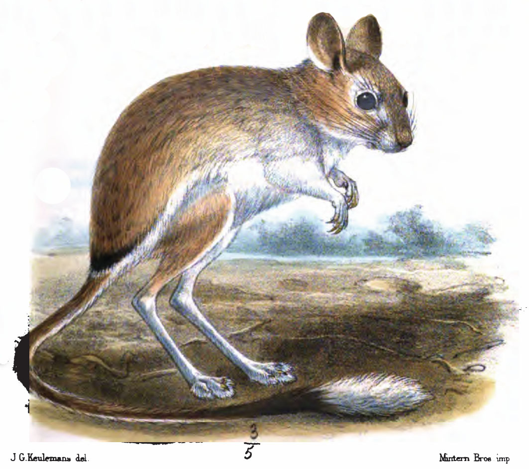 Jaculus jaculus ssp loftusi, Jerboa